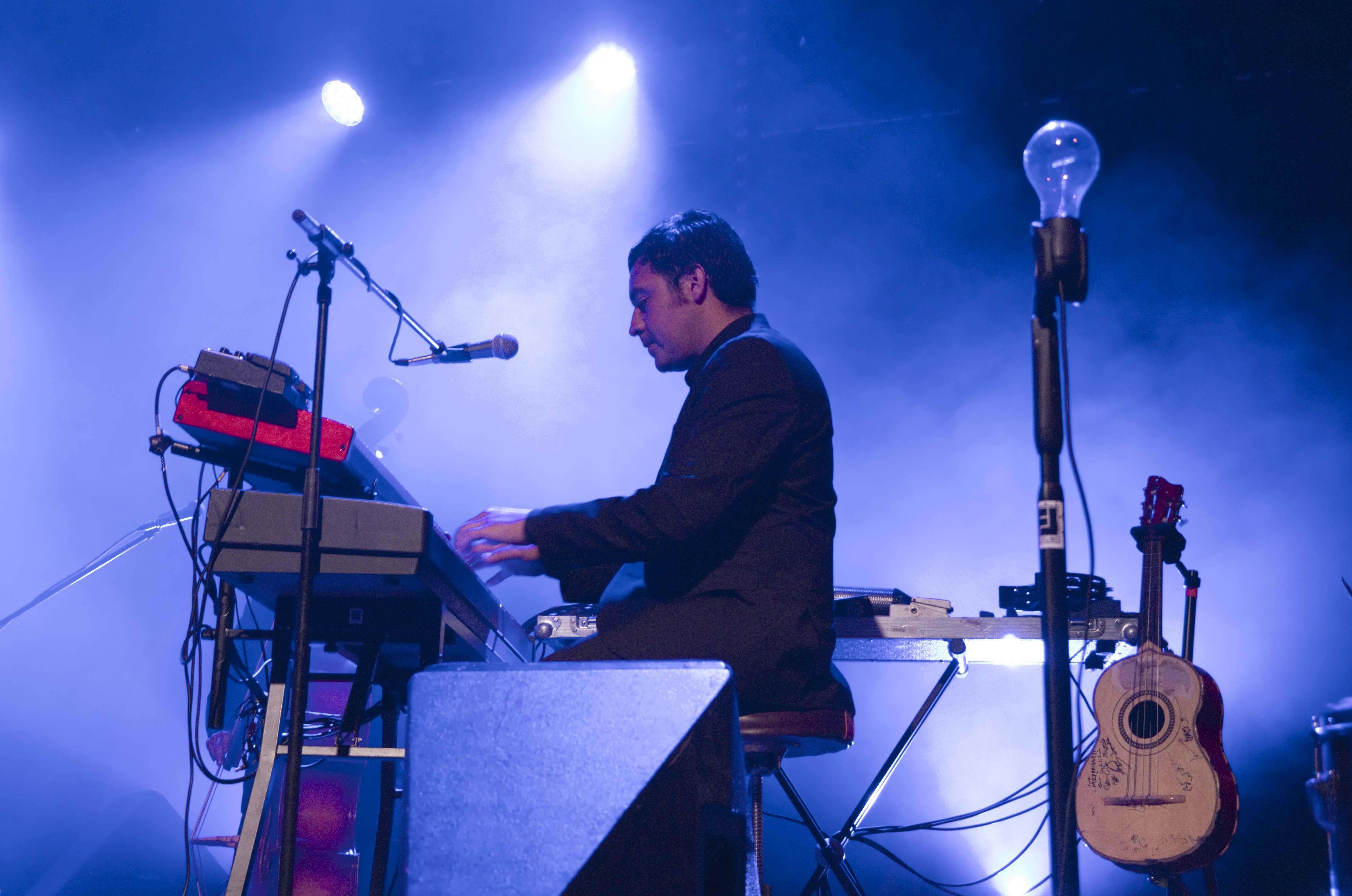 Das Zelt-Musik-Festival 2016 in Freiburg im Breisgau 13.07.2016 Calexico